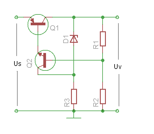 Kollektorkoormusega stabilisaator